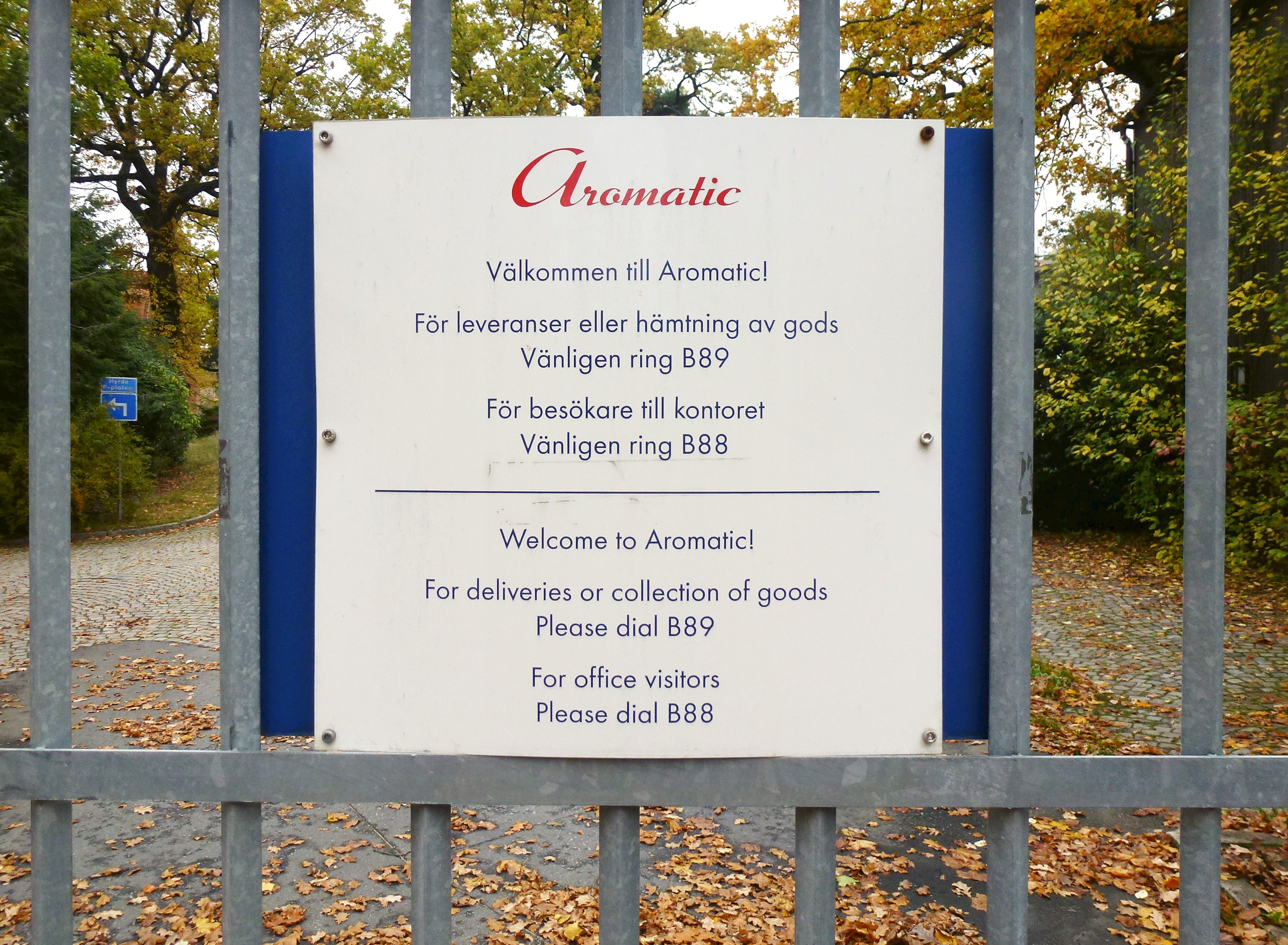 Aromatic Gröndal strax innan rivningen